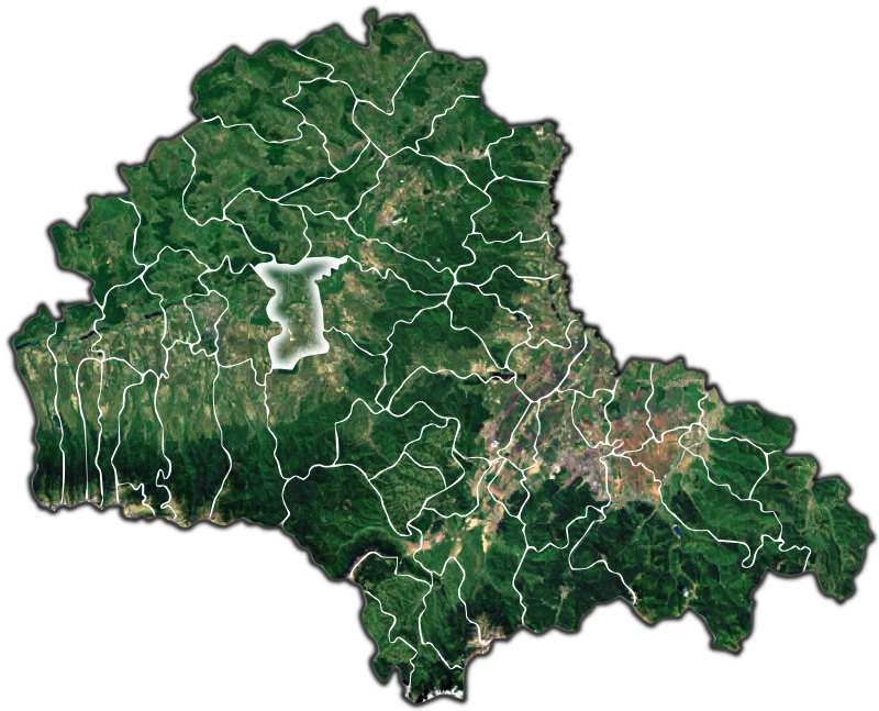 Sercaia jud Brasov.